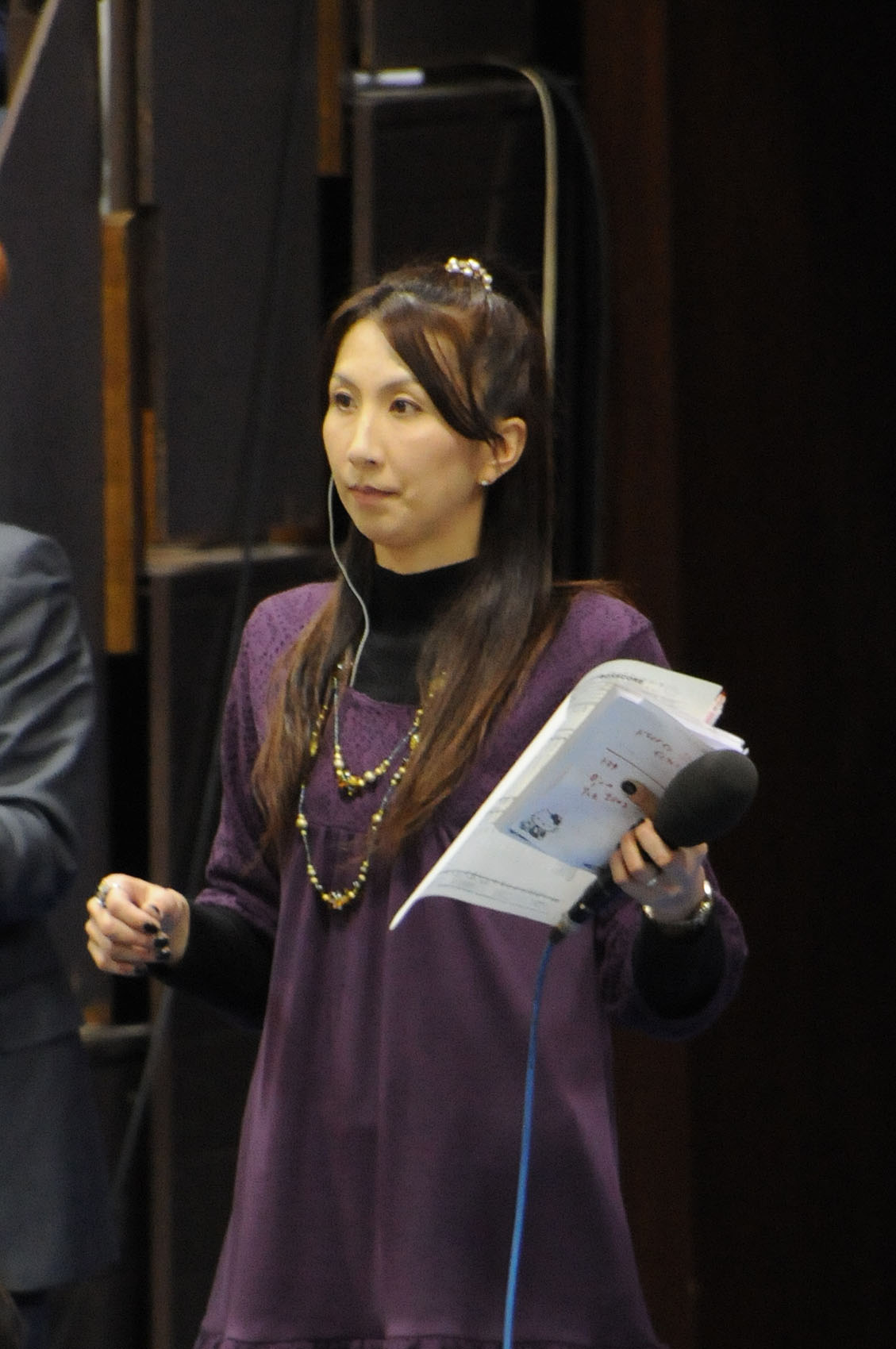 参河紀久子、代々木第二体育館で。